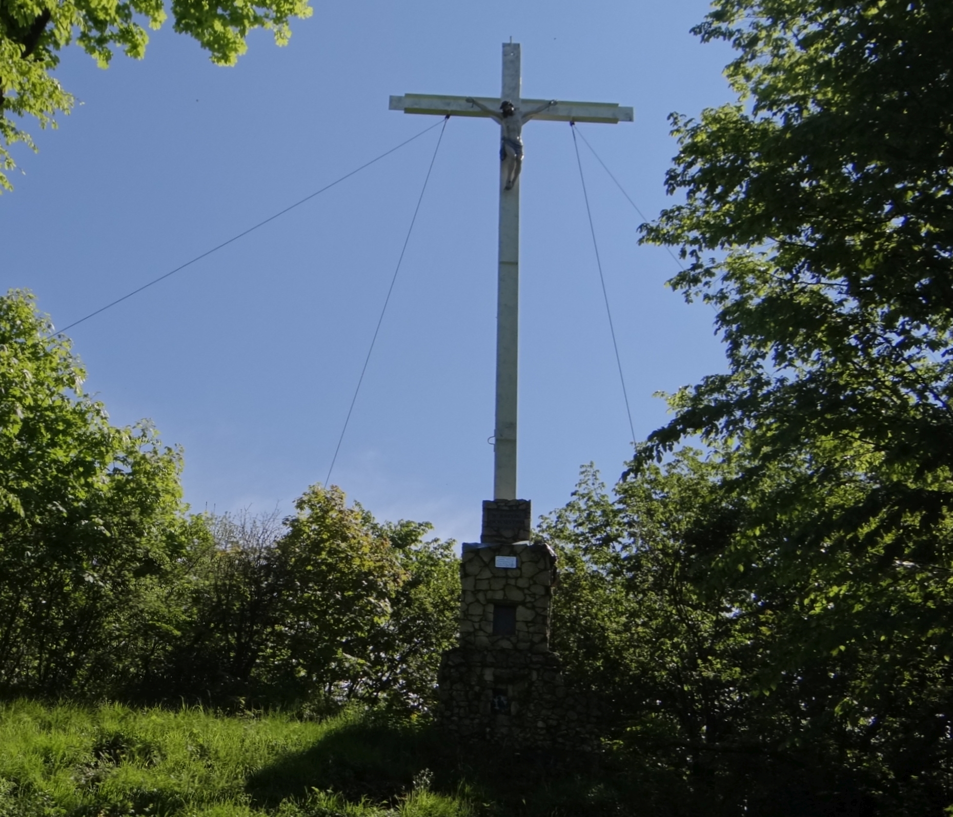 Bukowa Skała w Dolinie Szklarki